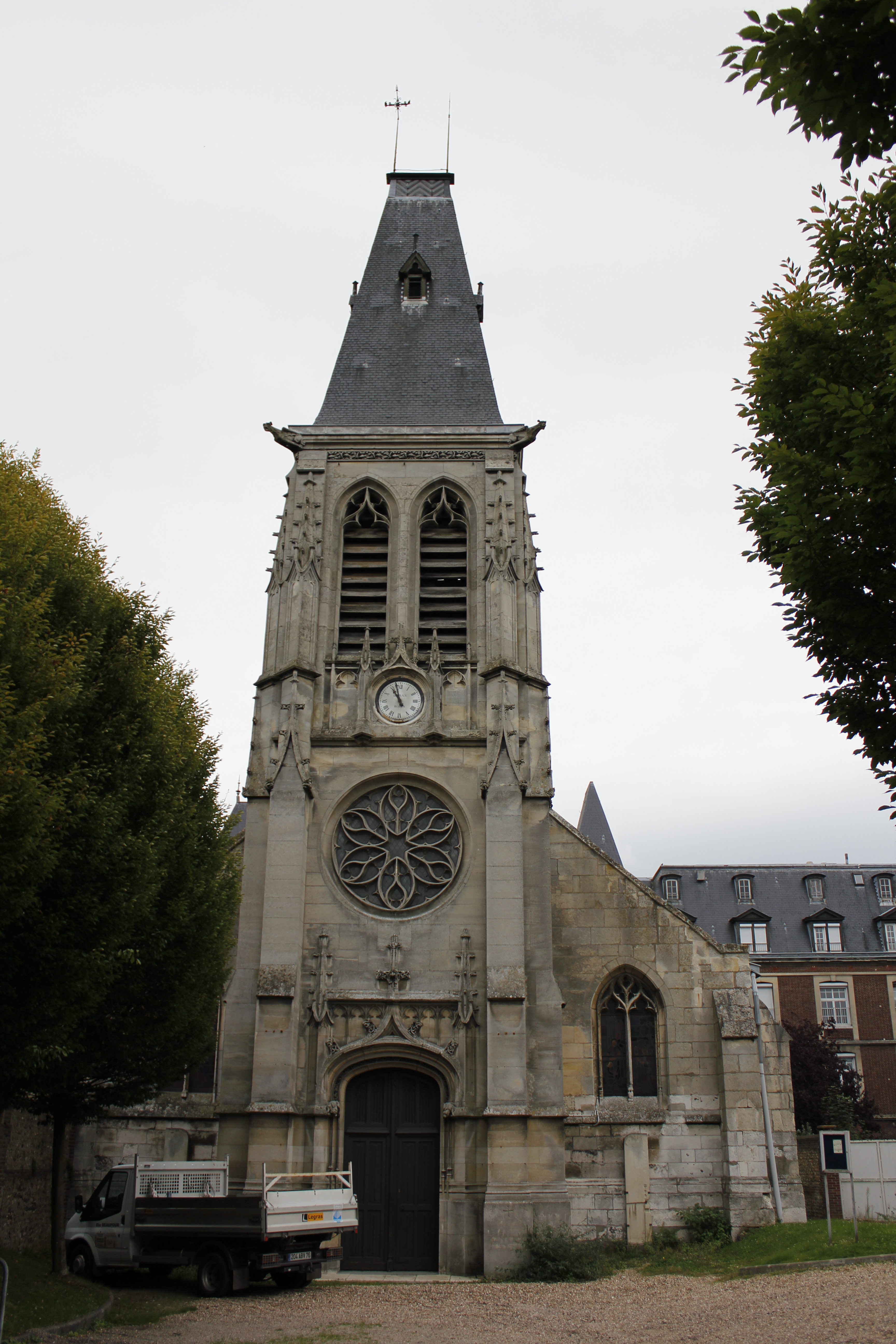 Eglise Saint-Thomas-du Mont-aux-Malades de Mont-Saint-Aignan .